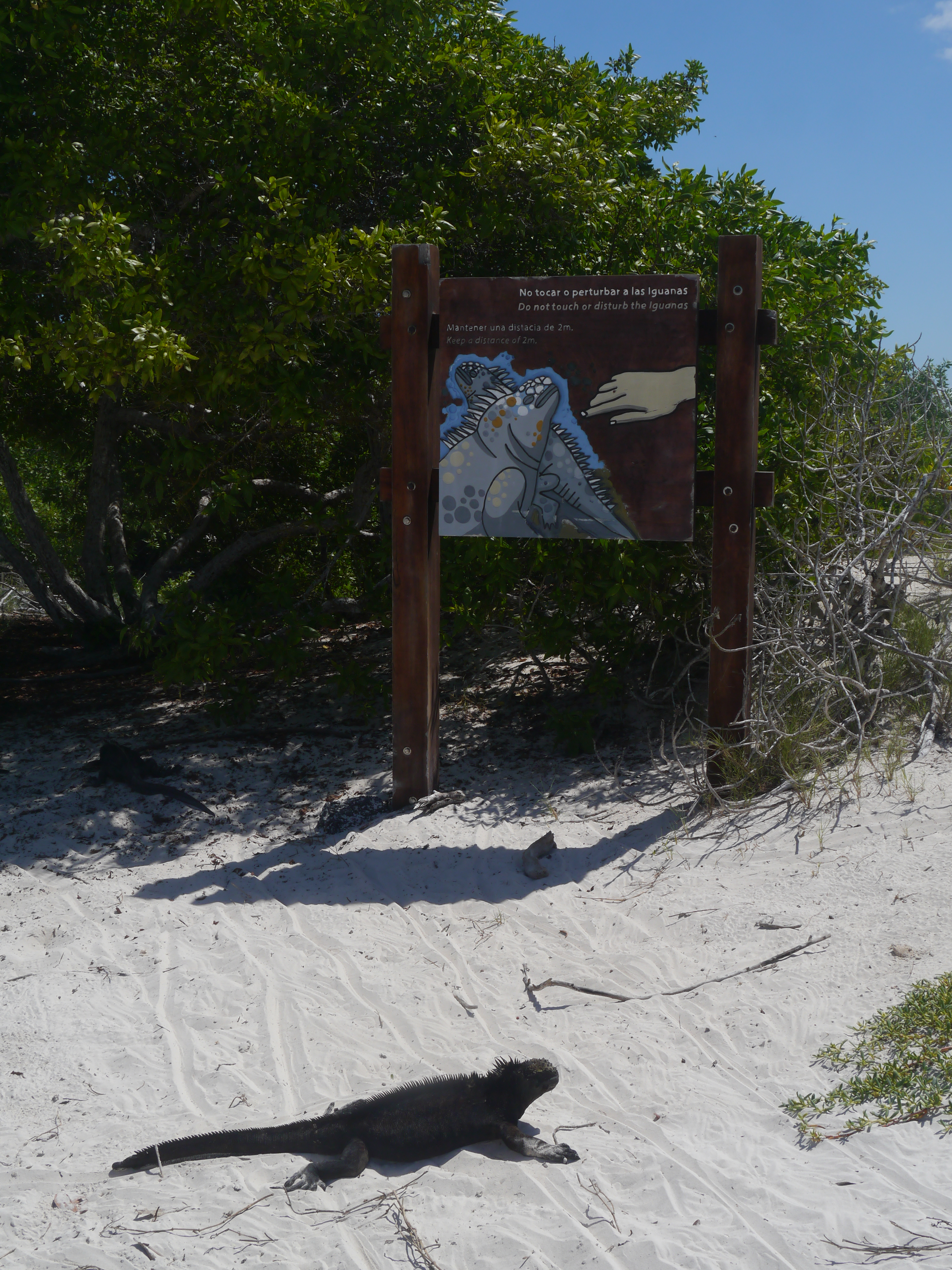 Iguana marina encontrada paseando por la playa de Tortuga Bay